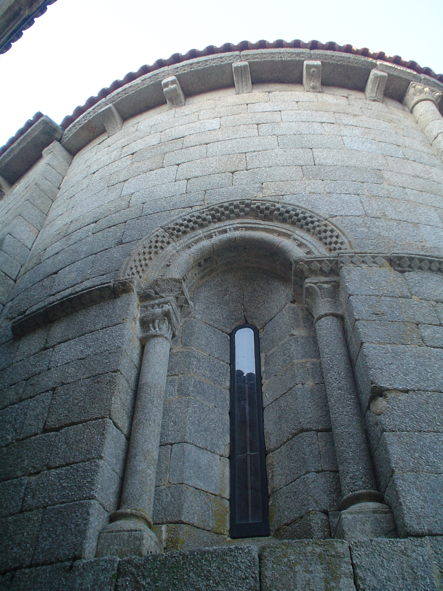 ventá da absida do mosteiro de San Clodio de Leiro